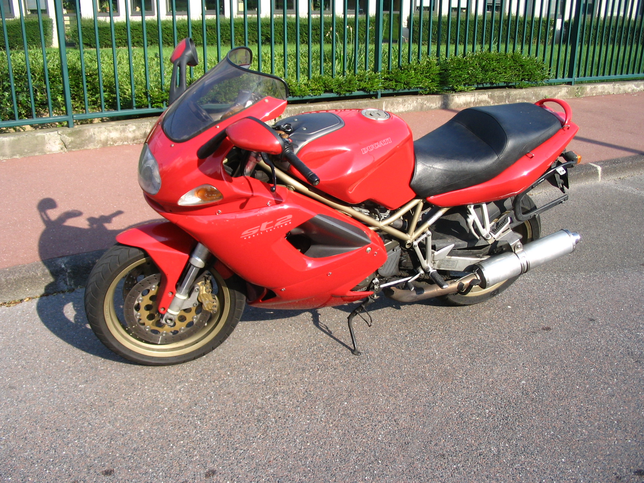 Ducati ST2, Xeuzuex